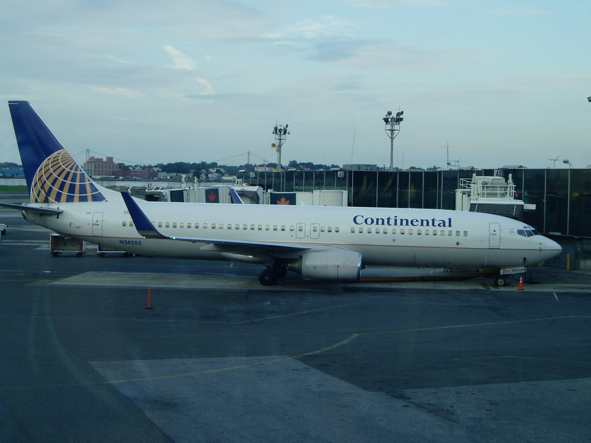 Boeing 737-800 fra Continental Airlines.